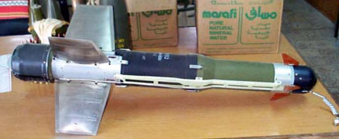 9M113 Konkurs missile (AT-5 Spandrel)